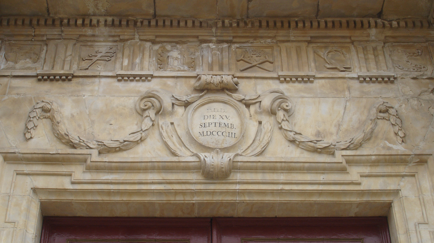 Catedral de Sant Pere de Vic (Vic, Osona, Catalunya, Espanya)